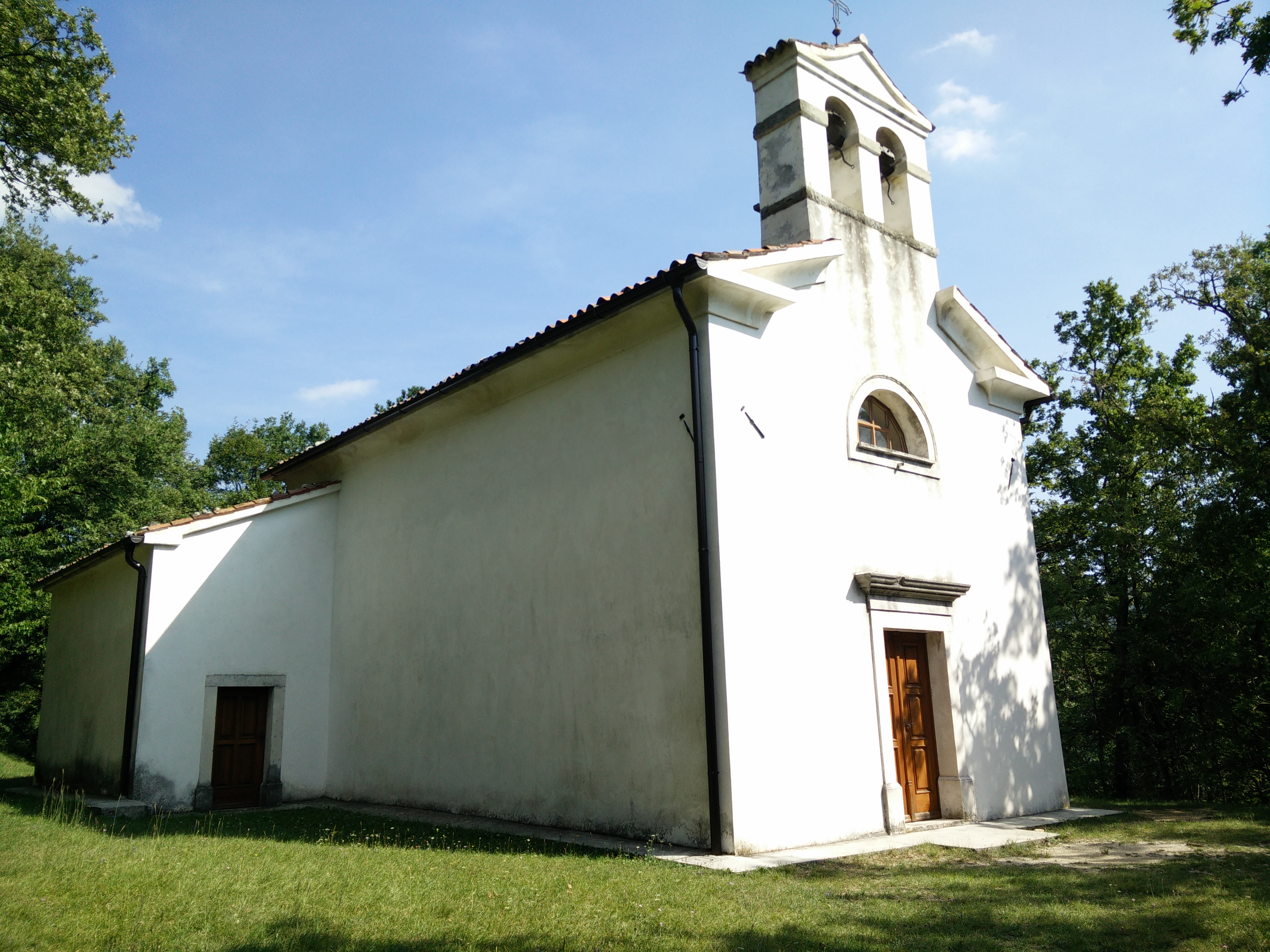 Cerkev svetega Ahaca v Budanjah.